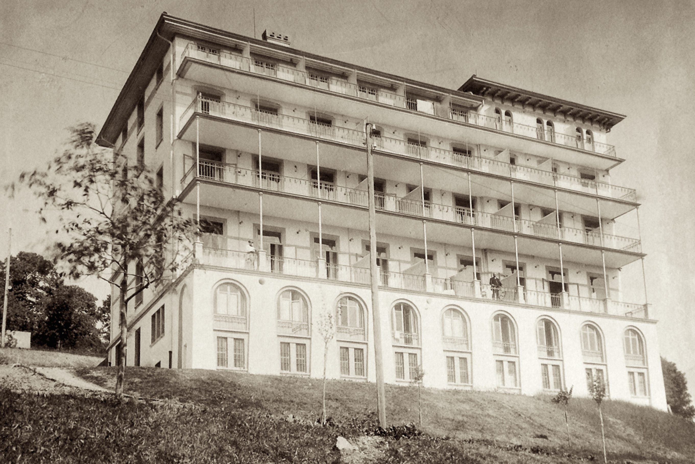 Kurhaus Cademario kurz nach seiner Fertigstellung 1914